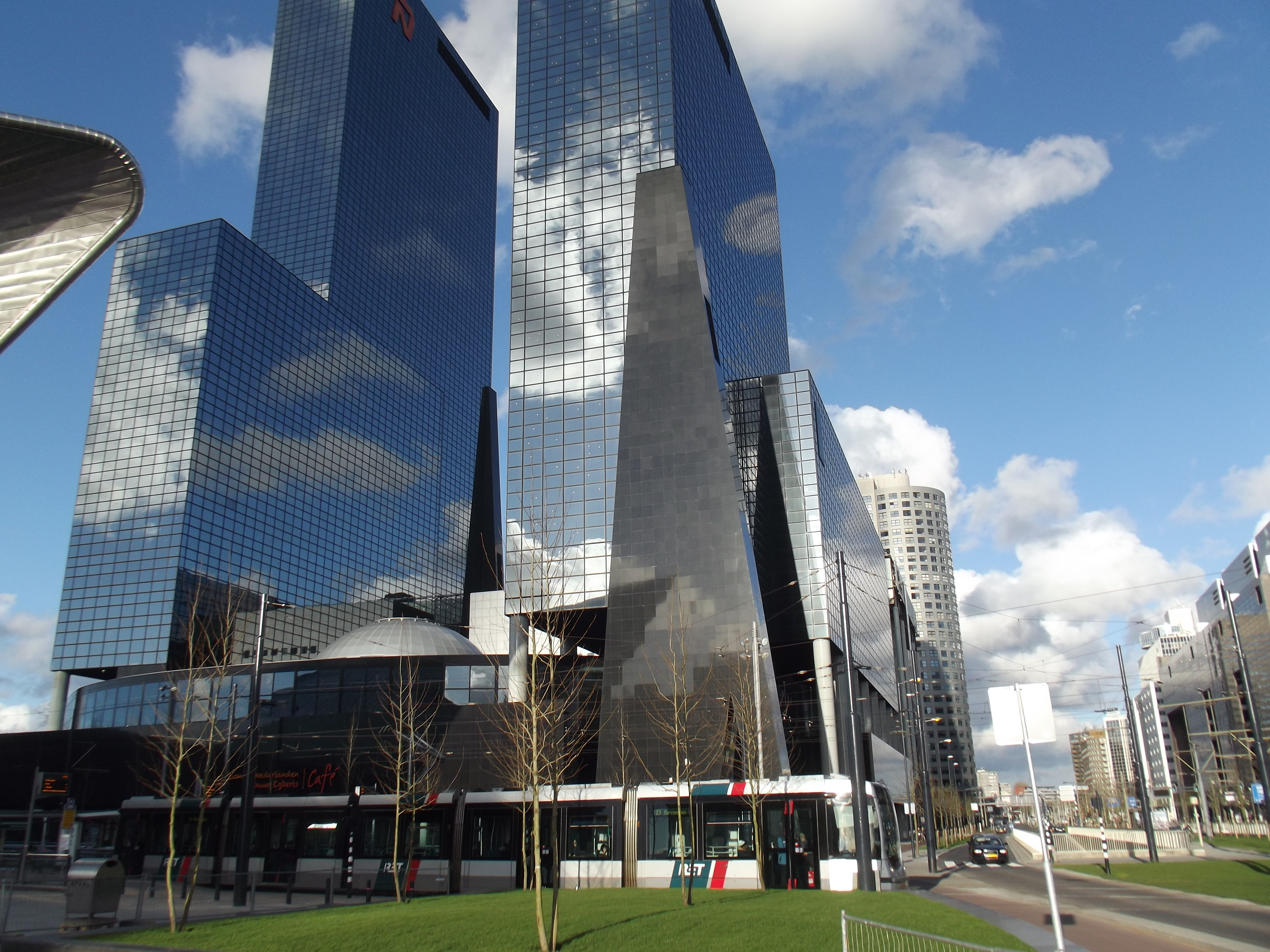 Tram die de Weena kruist.